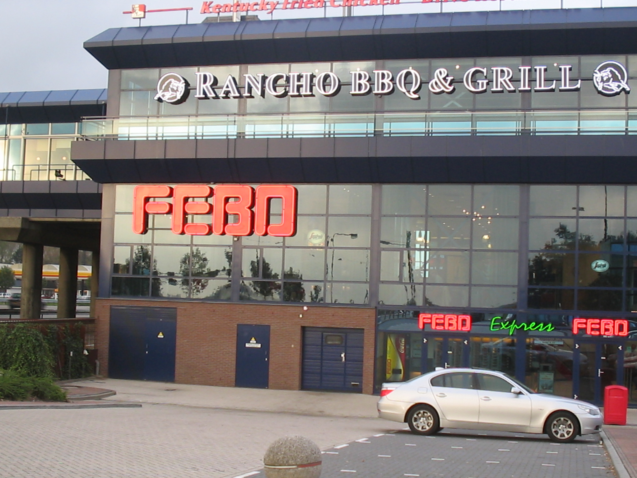 Febo snackbar aan A4